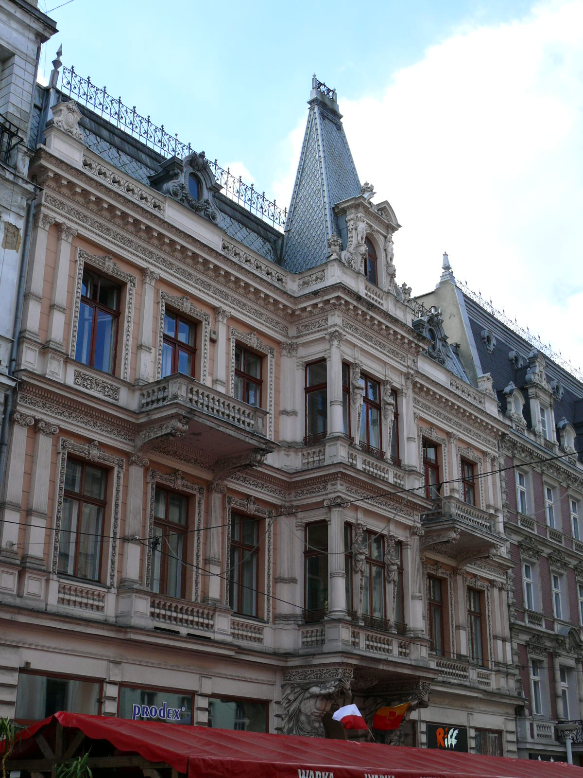 Kamienica Piotrkowska 53 w Łodzi